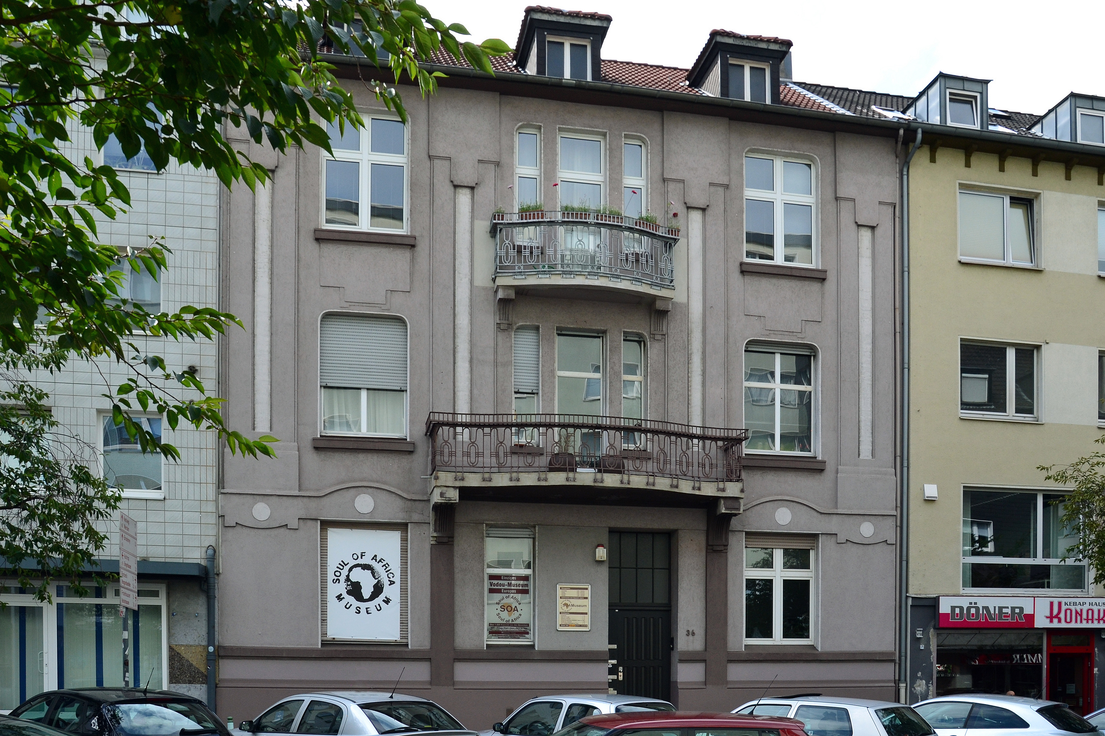 Soul of Africa Museum in Essen-Rüttenscheid